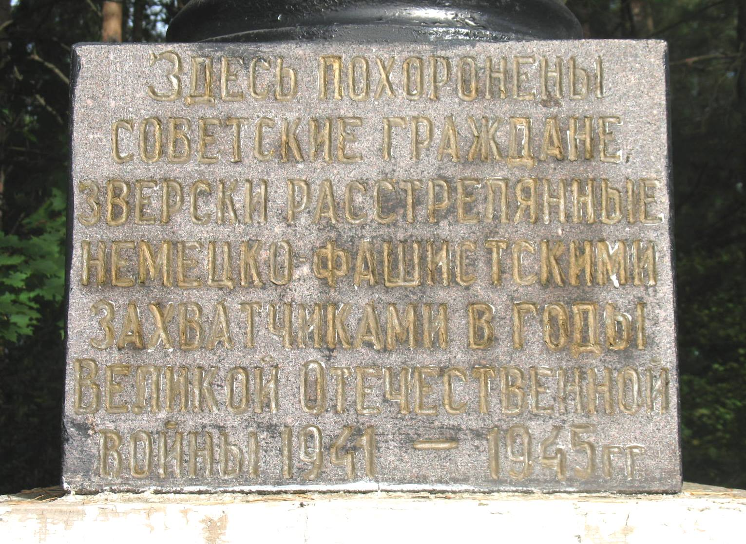 Памятник убитым нацистами евреям Логойска. Установлен в 1970-е годы.